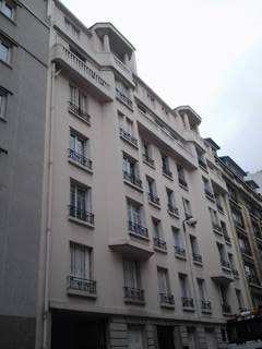 L'immeuble sis 34 rue du Cotentin à Paris (15e arrondissement), domicile de la femme de lettres Claire Sainte-Soline (1891-1967). Août 2015.